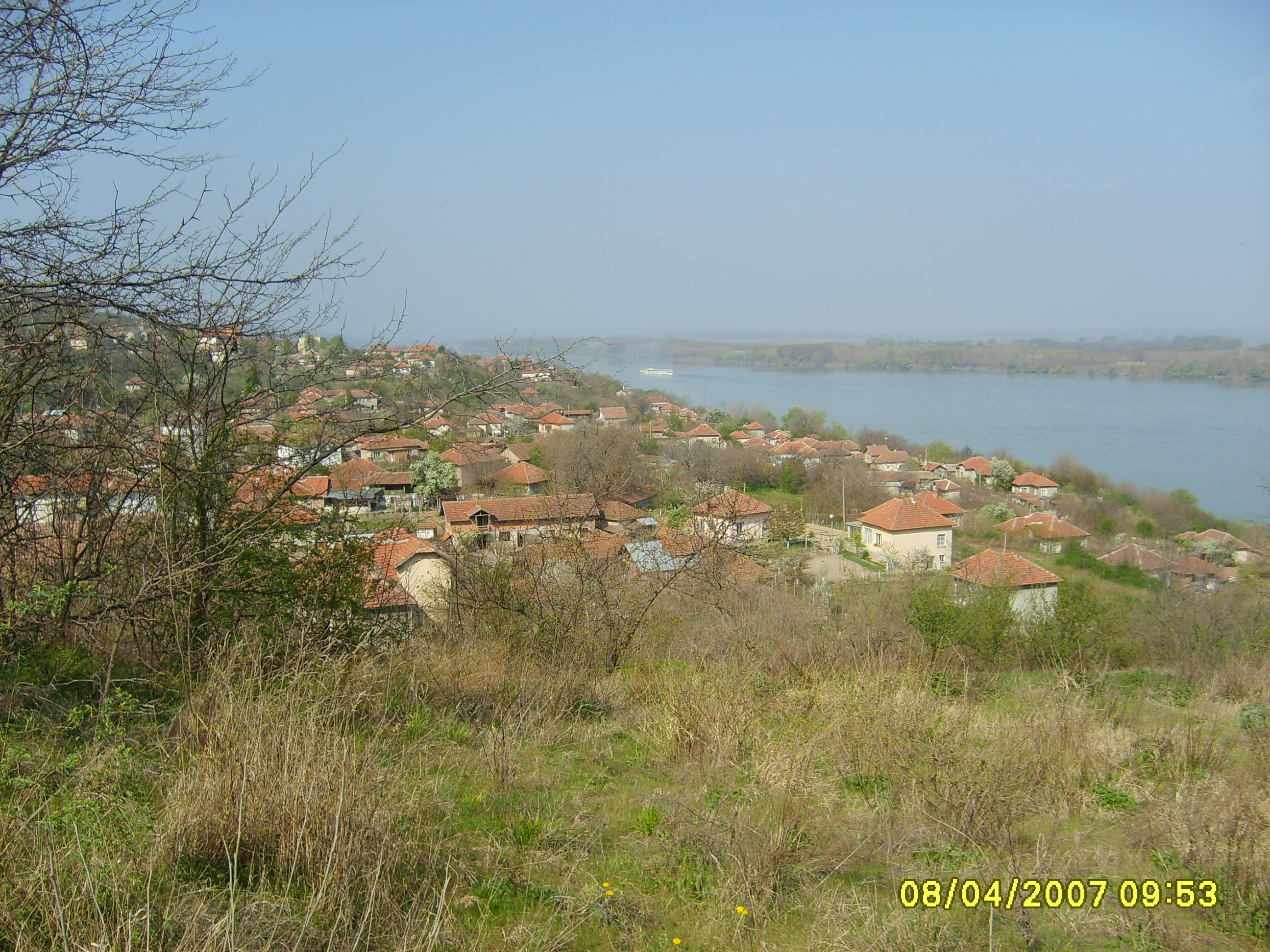 Изглед към Горни Вадин